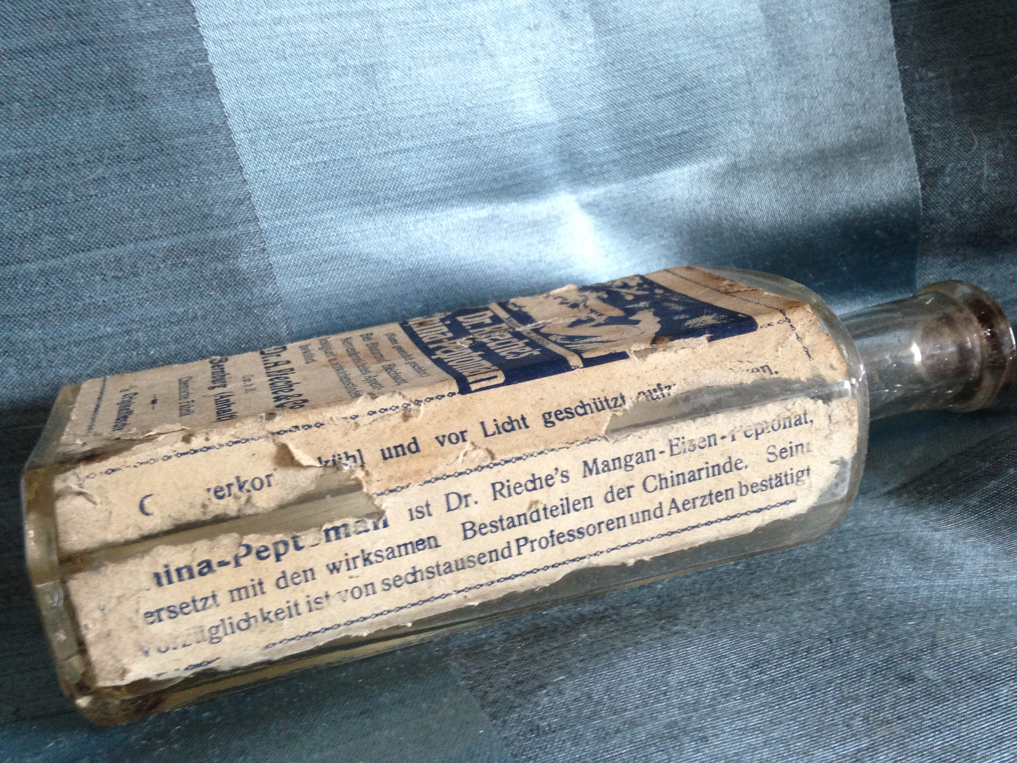 Dr. Rieche's China-Peptoman (Flasche, Seite 2), historisch ca. 1910 bis 1919